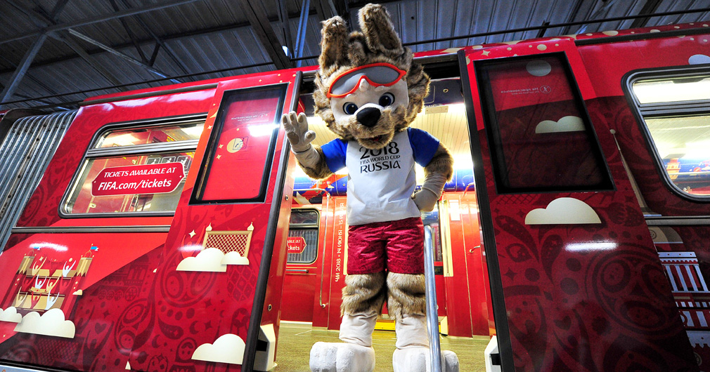 На презентации метросостава